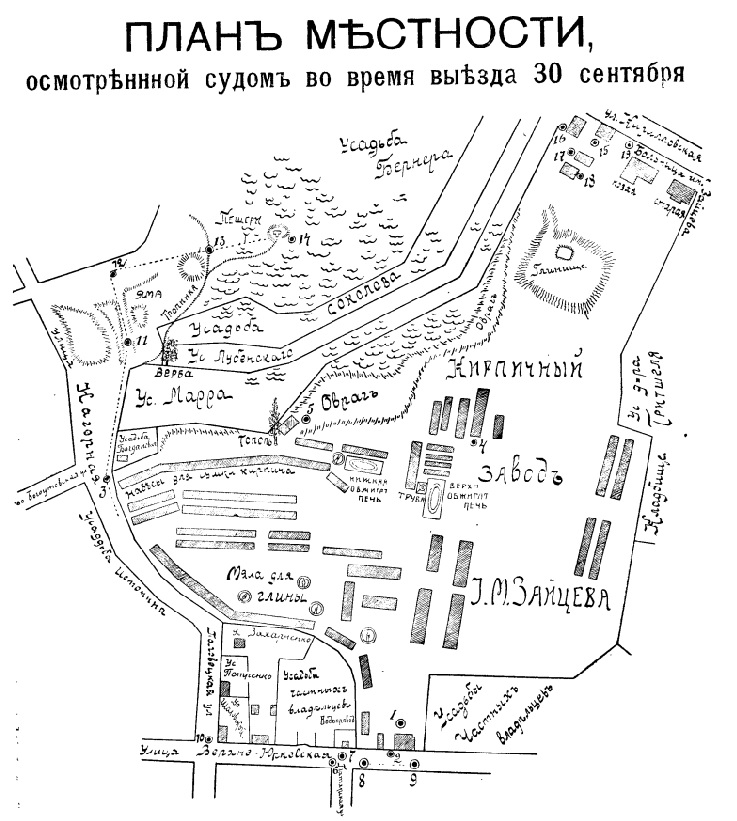 Дело Бейлиса. План местности, осмотренной судом 30 сентября 1913. Объяснение номеров: 1. Дом, где жил обвиняемый Мендель Бейлис. 2. Ворота на Верхне-Юрковскую улицу. 3. Ворота на Нагорную улицу. 4. Сгоревшее помещение, где была шорная мастерская. 5. Изба, где жил свидетель Юхриков. 6. Место, где стоял свидетель Константин Добжанский, когда увидел Андрея Ющинского. 7. Место, где находился Андрей Ющинский, когда его видел Константин Добжанский. 8-9. Путь, по которому шёл Андрей Ющинский, когда его видел Константин Добжанский. 10. Место, на котором свидетельница Ульяна Шаховская, по её словам, видела Андрея Ющинского. 11. Место, с которого свидетель Ященко увидел в первый раз неизвестного человека. 12. Место, с которого свидетель Ященко увидел во второй раз того же человека. 13. Место, где остановился тот человек, когда заметил свидетеля Василия Ященко. 14. Пещера, где был обнаружен труп Андрея Ющинского. 15. Дом, где живут Хаим и Борух Дубовики. 16. Неоконченный дом. 17. Богадельня, построенная Зайцевым, где живут престарелые евреи и где предполагалось устроить молельню. 18. Дом, где живёт мать управляющего заводом Дубовика. 19. Ворота на Кирилловскую улицу.